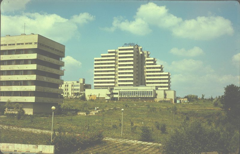 Sanatorium "Moldova" (1985).